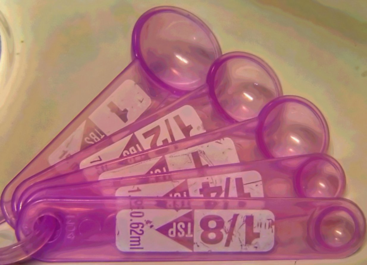 Plastic measuring spoons Des cuillères-mesures en plastique Messlöffel